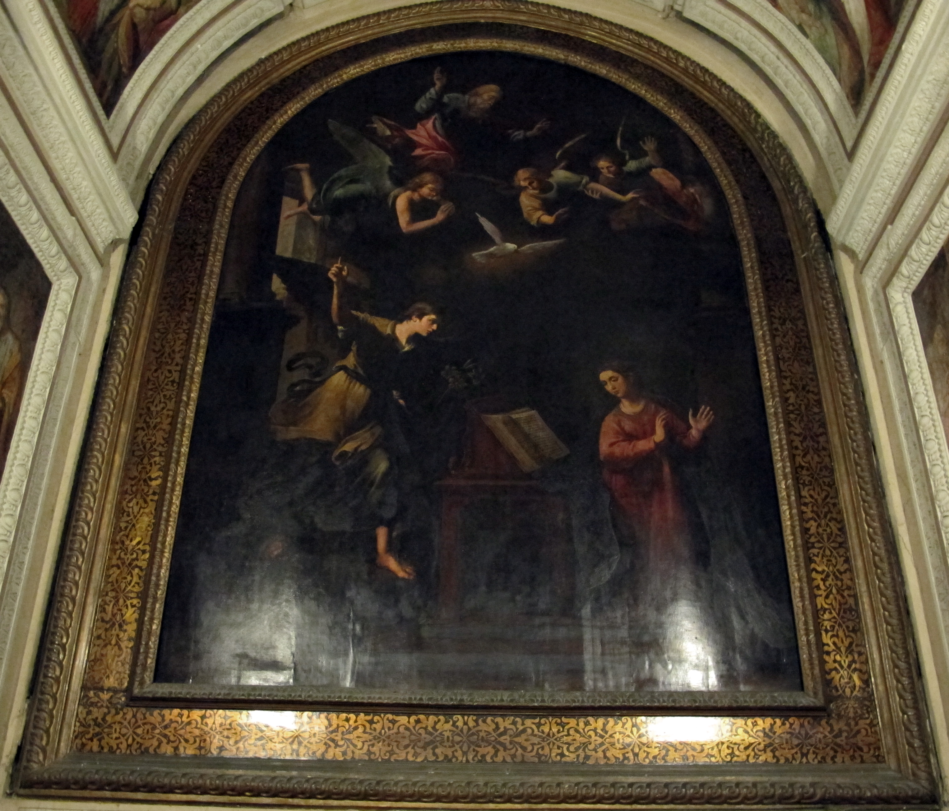 annunciazione